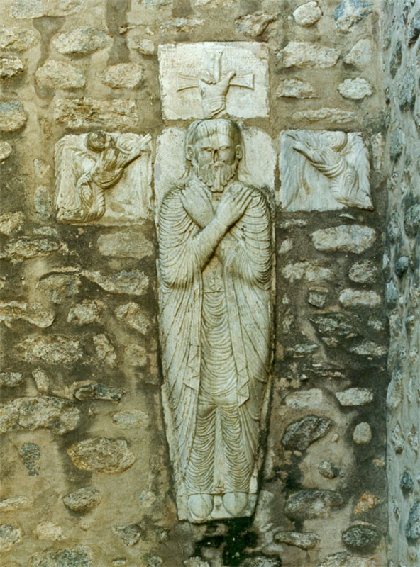 Abadia de Santa Maria d'Arles. Tomba de Gillem Gaucelm. Vallespir, França